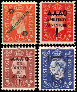 Германские марки-пародии почтовой марки Великобритании, Георг VI, 1937 год, с пропагандистскими надпечатками, 1944.